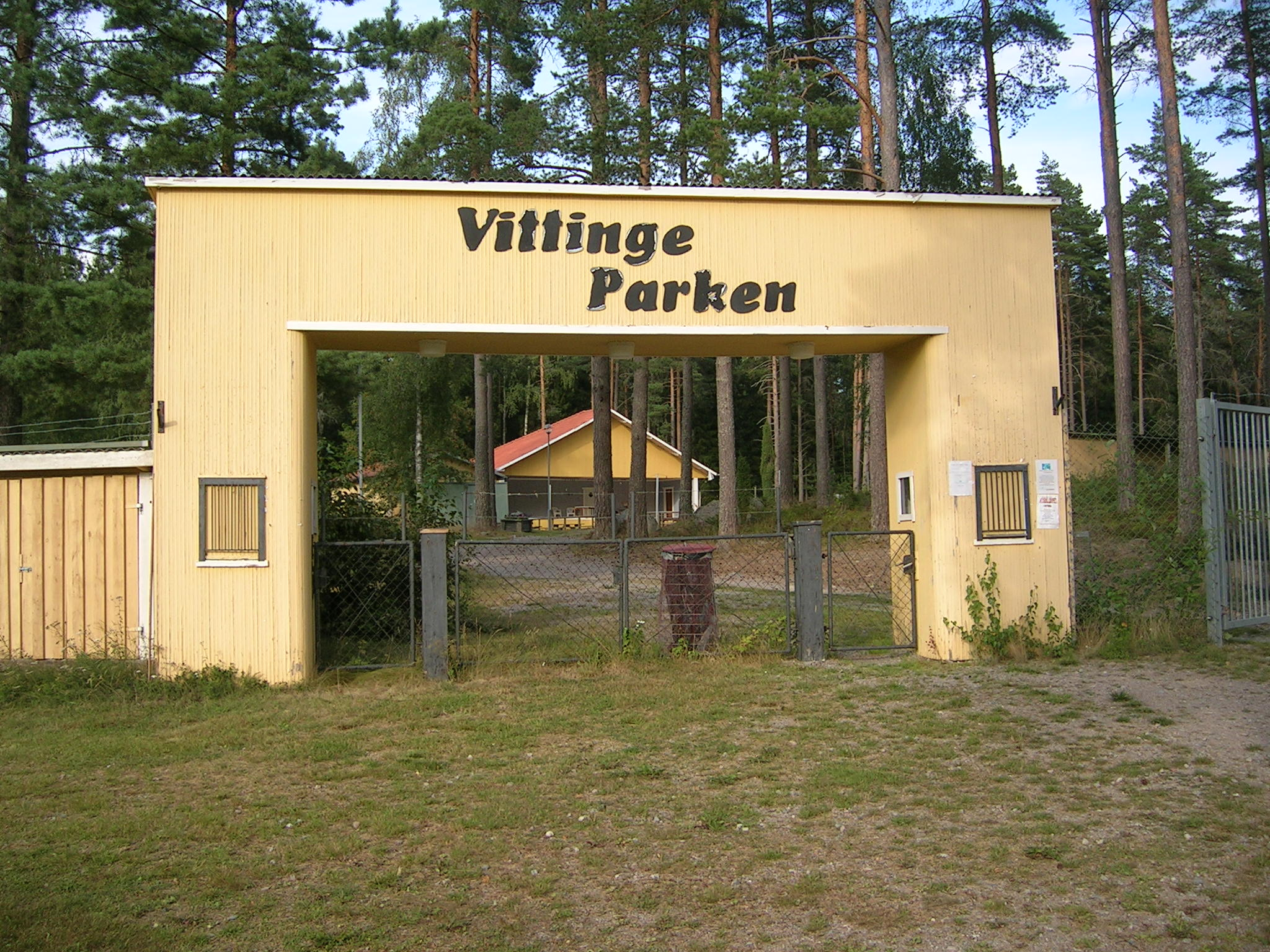 Vittinge parkens entré